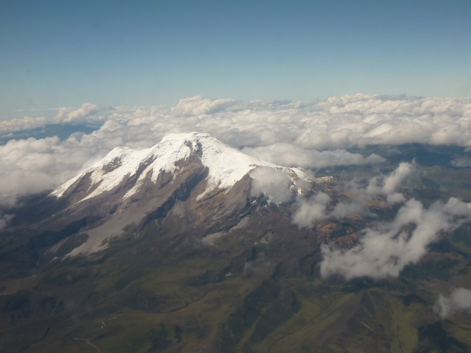 Vista aérea del volcán Cayambe